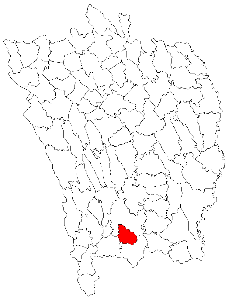 Categorie:Hărţi ale judeţului Vaslui